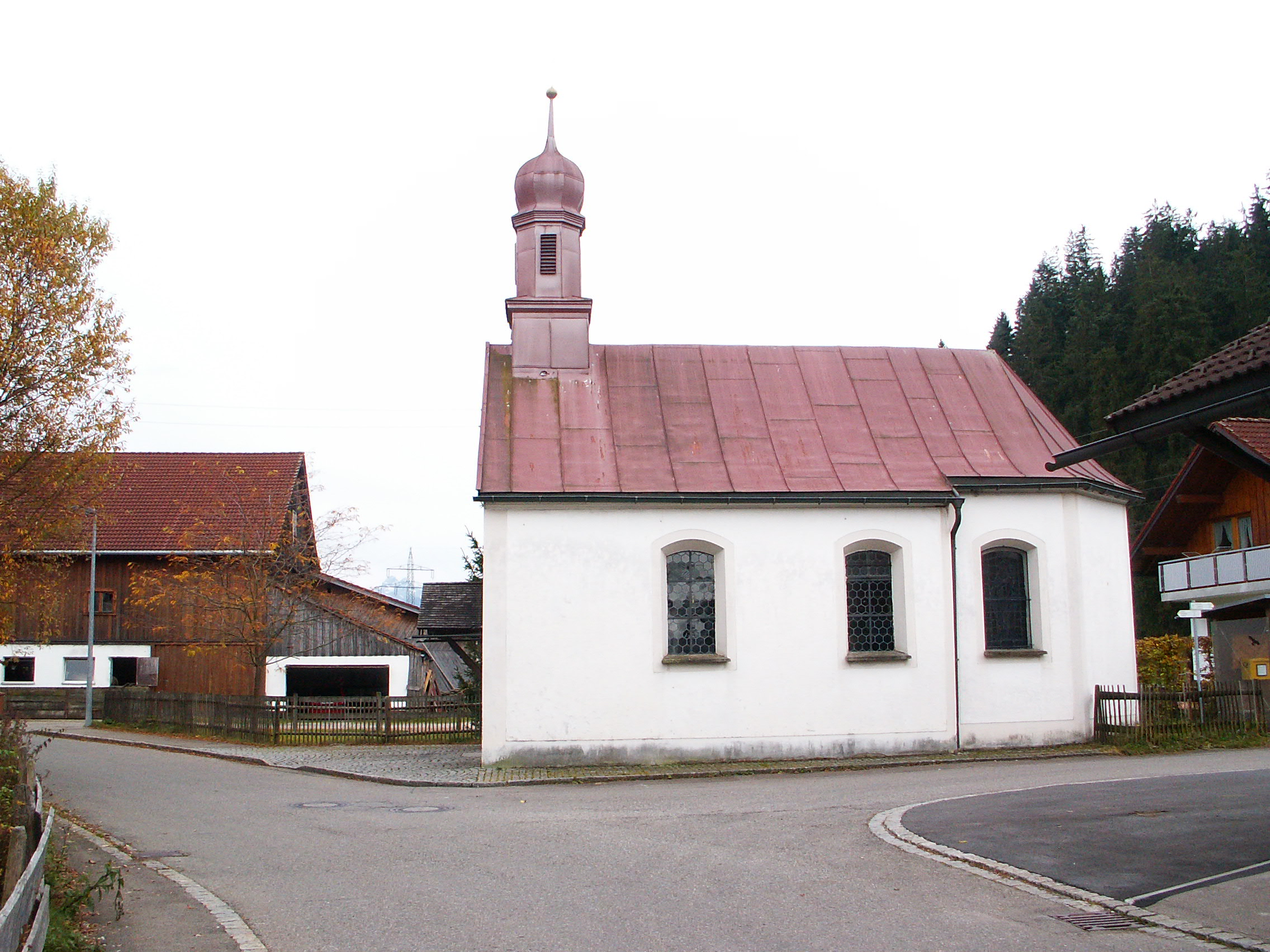 Kapelle in Sigishofen, Ofterschwang